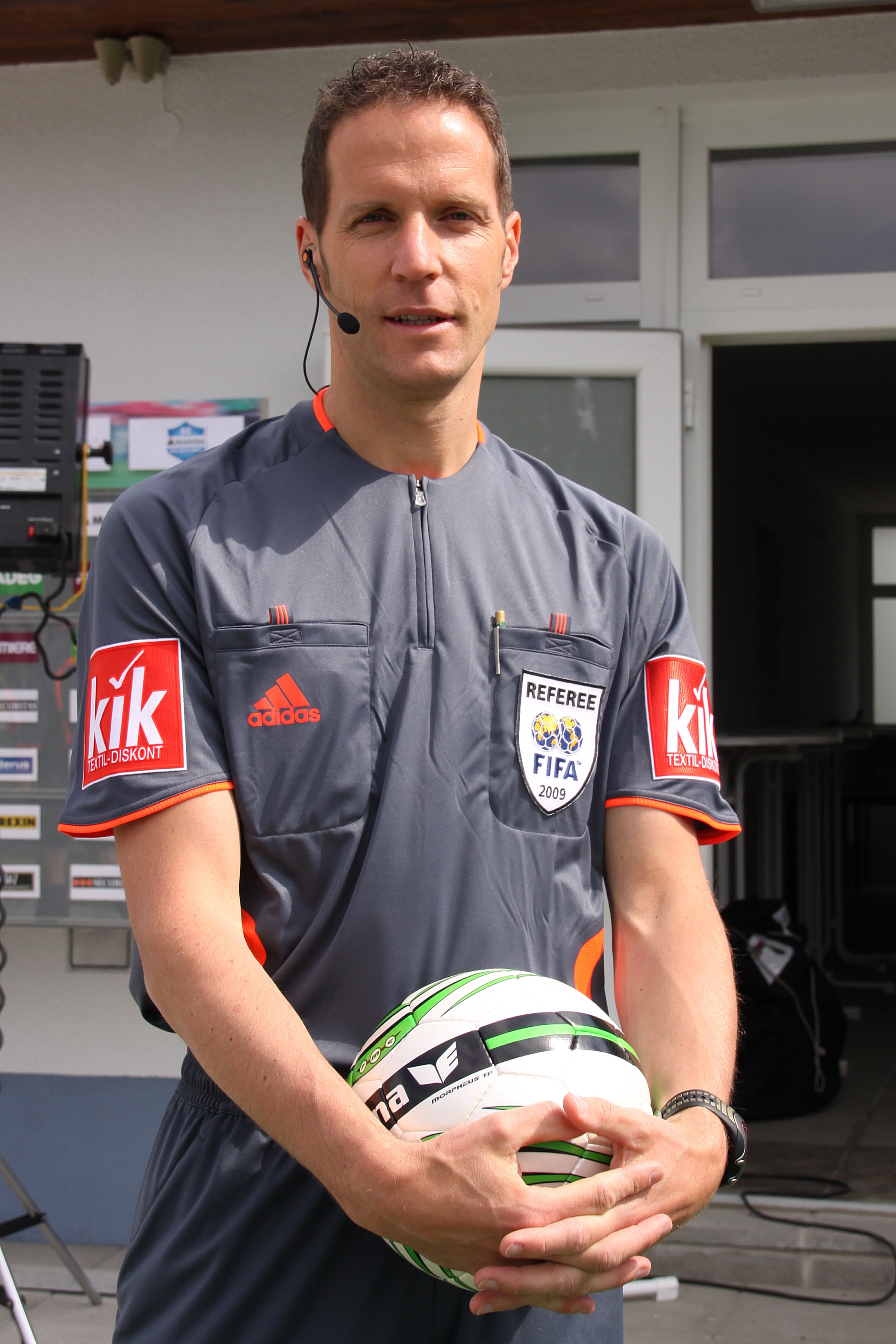 Robert Schörgenhofer - österreichischer Fußballschiedsrichter (Bild 1)